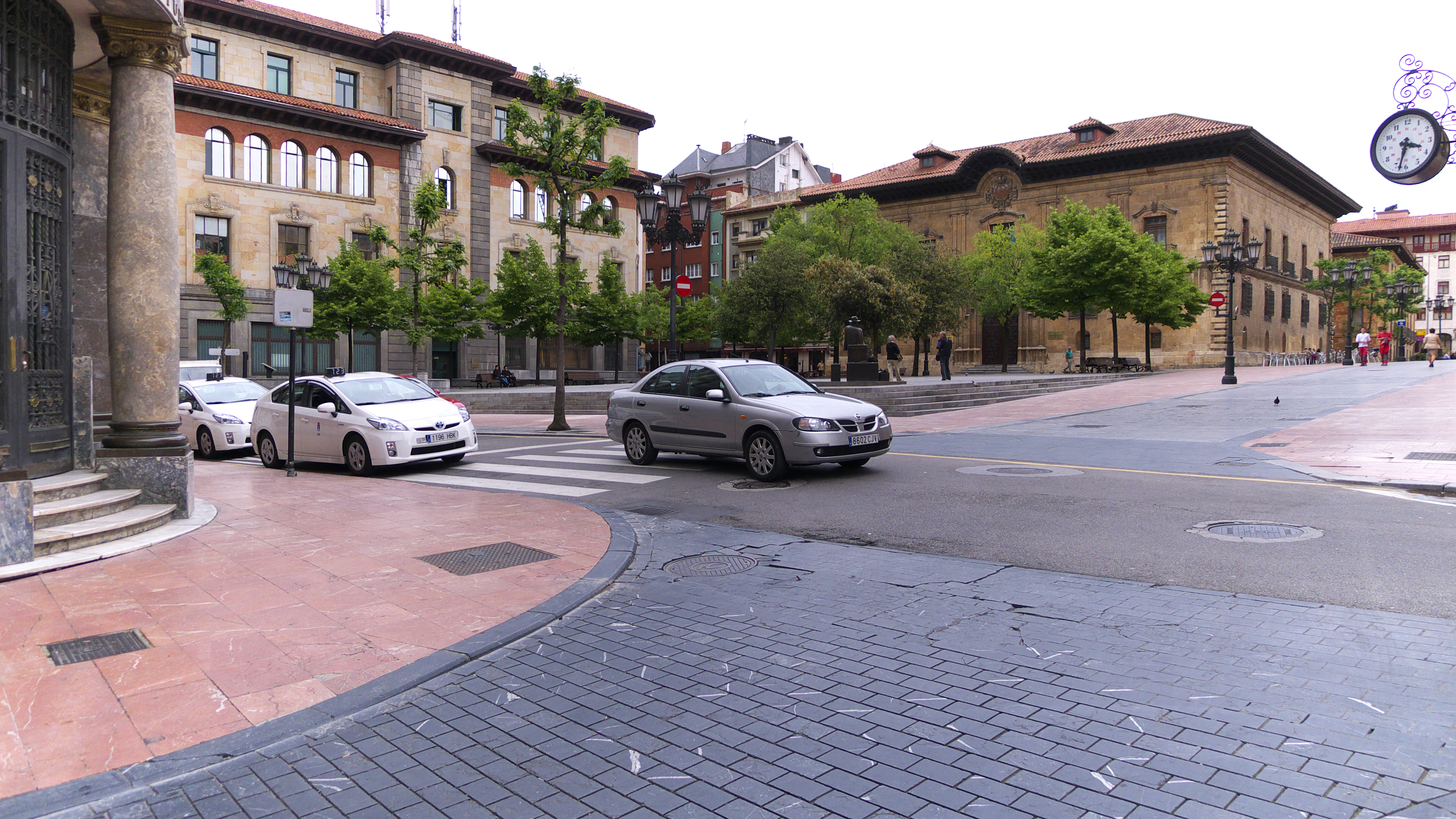 En memoria del militar, Juan Díaz Porlier.